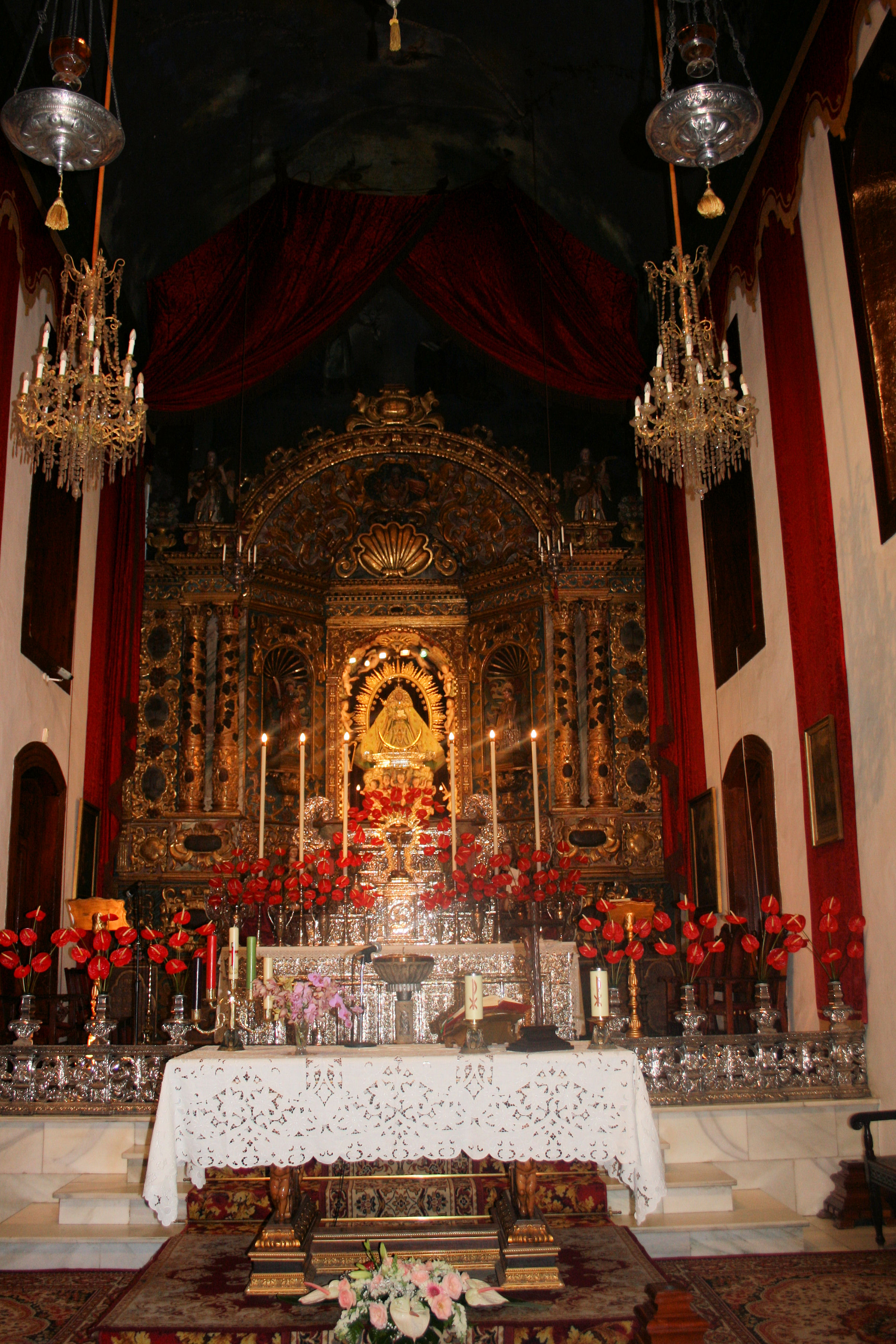 Kirche Unsere Jungfrau vom Schnee auf La Palma